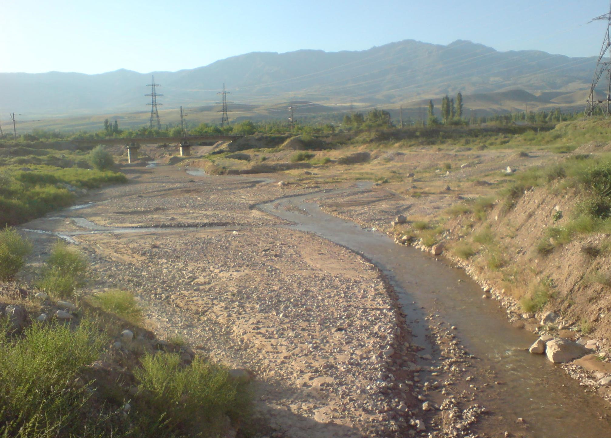 Река Гальвасай пересекается с железной дорогой Ташкент - Ходжикент перед устьем, близ города Газалкент Ташкентский вилоят, Узбекистан